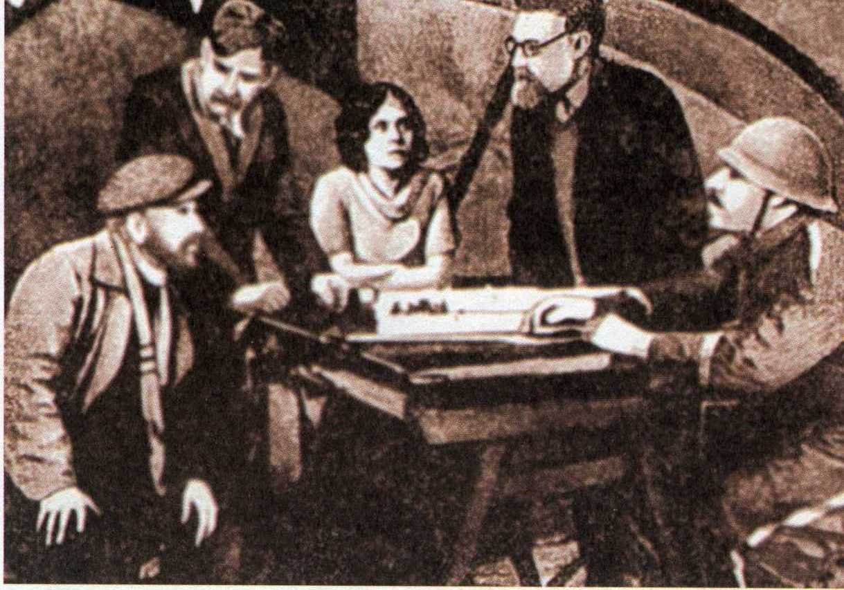 Беларуская (тарашкевіца): Сцэна з спэктаклю «Сяржант Дроб» Э. Самуйлёнка на сцэне Беларускага трэцяга дзяржаўнага тэатру